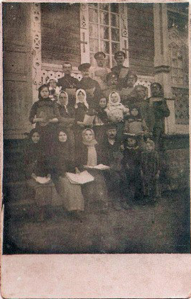 Беларуская (тарашкевіца): Пясочнае (Piasočnaje). Царква, хор